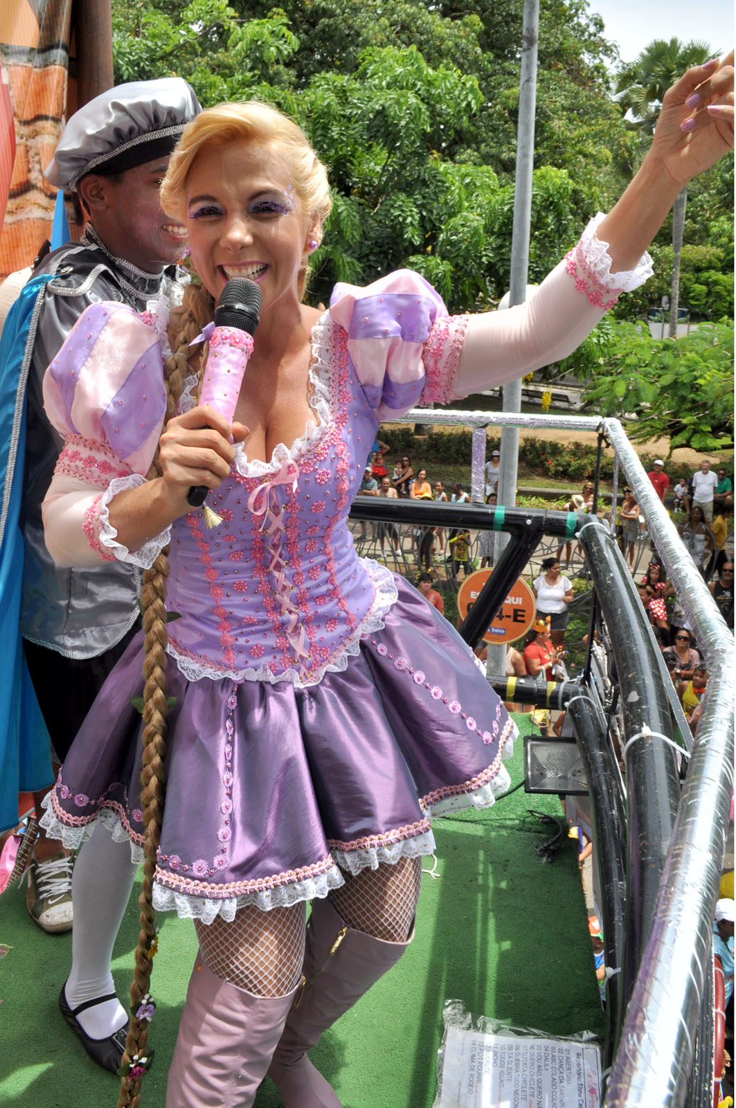 Carla Perez